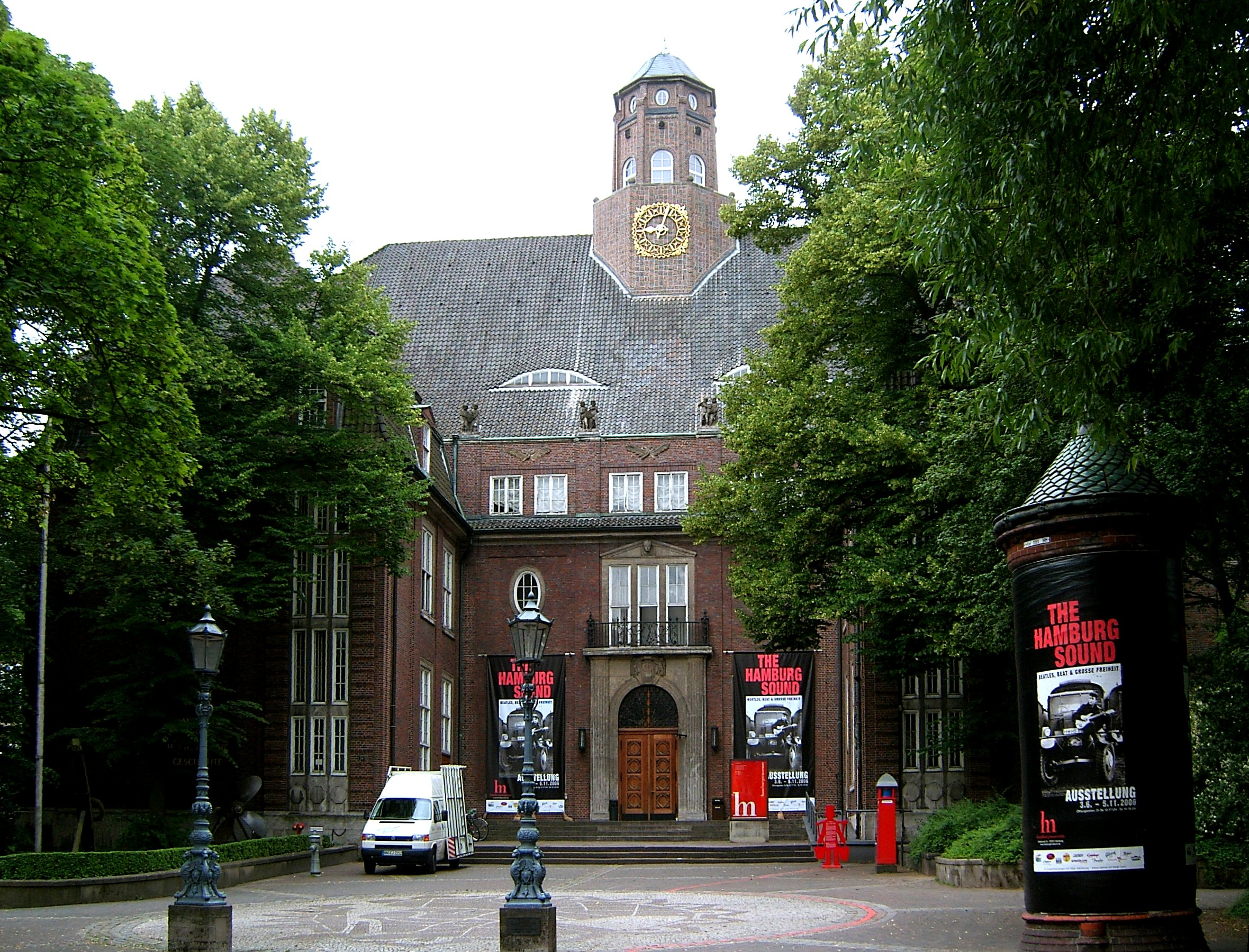 Das Gebäude des Museums für Hamburgische Geschichte in der Hamburger-Neustadt wurde von 1914 bis 1923 errichtet und gilt als eines der Hauptwerke Fritz Schumachers.